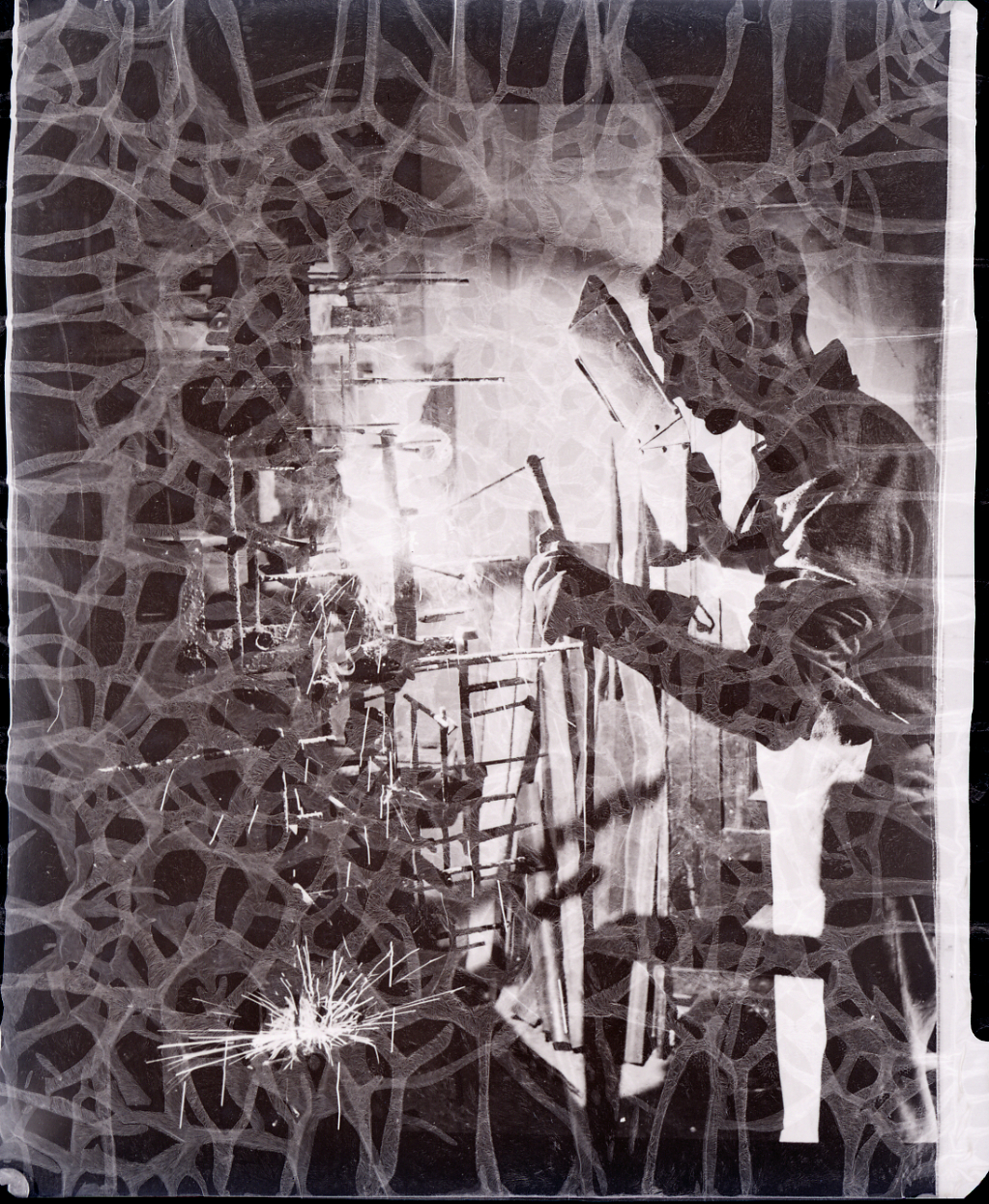 Servizio fotografico : Italia, 1975 / Paolo Monti. - Buste: 12, Fototipi: 13 : Negativo b/n, gelatina bromuro d'argento/ pellicola ; 10x12. - ((Serie costituita da 13 negativi identificati con i nn.: 503, 505, 557-559, 576-578, 581-583 e una busta senza numerazione su cui è manoscritto: "Riproduzione del 151 - Pannello". La suddetta serie è contenuta nella scatola identificata con la numerazione G1676/1737. Sul coperchio della scatola manoscritto: "Zodiac 1/ 1-77"